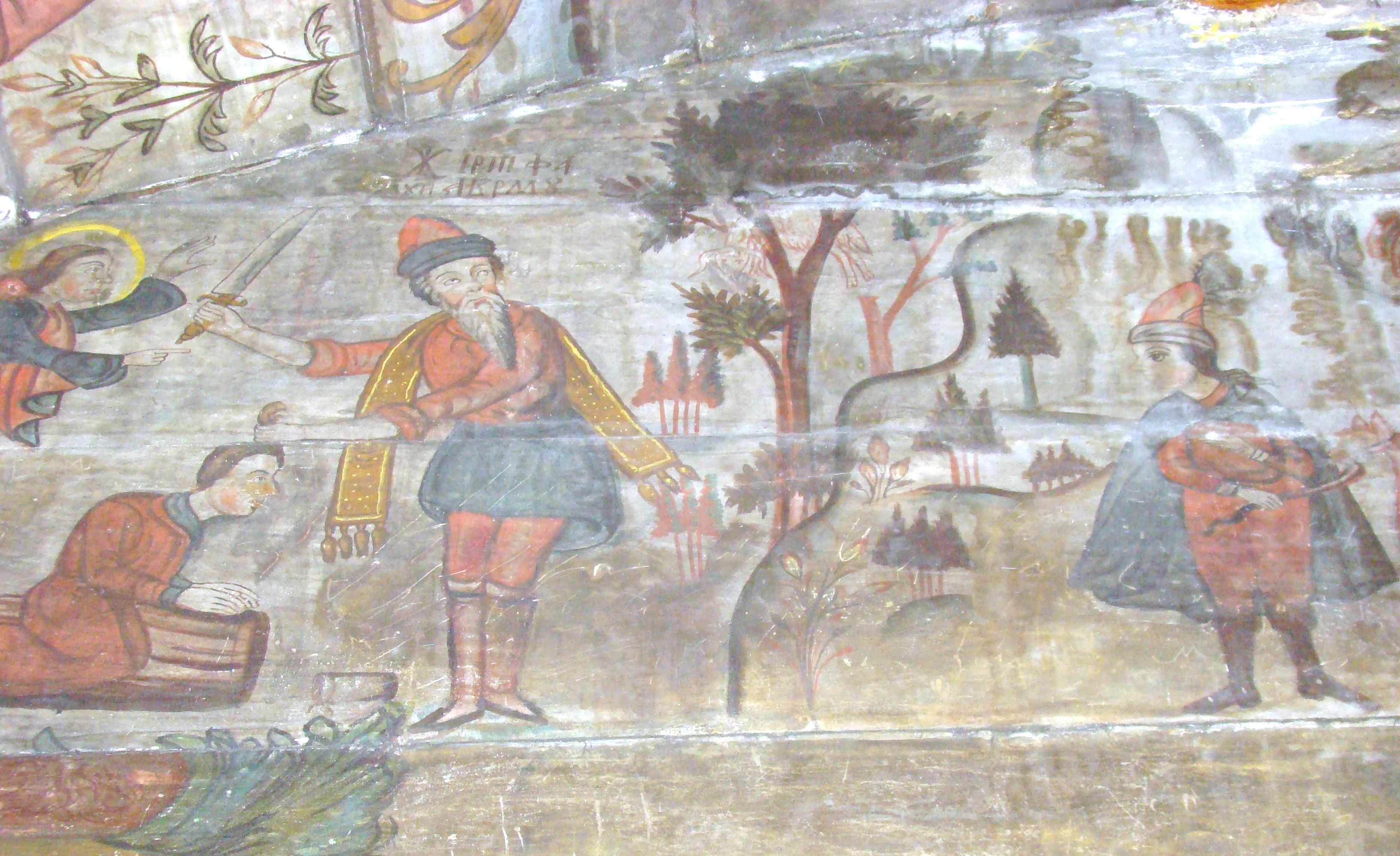 Biserica de lemn din Ticu-colonie, județul Cluj